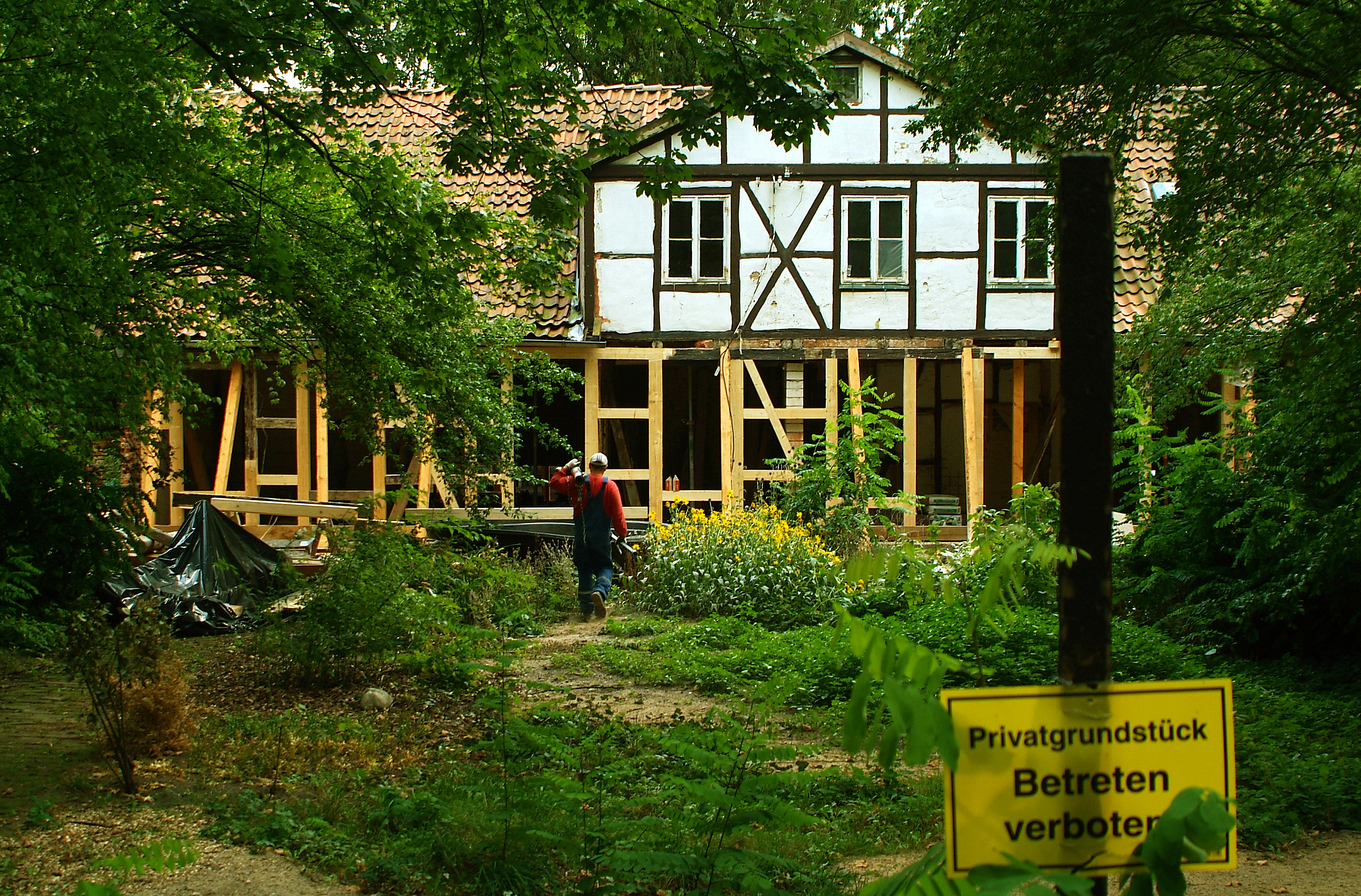 Neuere dendrochronologische Untersuchungen haben nahegelegt, daß das denkmalgeschützte Gartenhaus im Stadtteil Nordstadt von Hannover möglicherweise erst um 1850 errichtet worden sein könnte. Dann wäre es von Anfang an als Nebengebäude der ehemaligen "königlich privilegierten Wachstuchmacherey vor dem Steinthore" (heute: Benecke-Kaliko AG) errichtet worden, die in etwa auf dem Gebiet des ab 1912 angrenzenden Brüggemannhofes lag. Das Gebäude wurde mittlerweile an Privat verkauft und wird - zum Zeitpunkt dieser Aufnahme - mit erheblichem Aufwand saniert ...